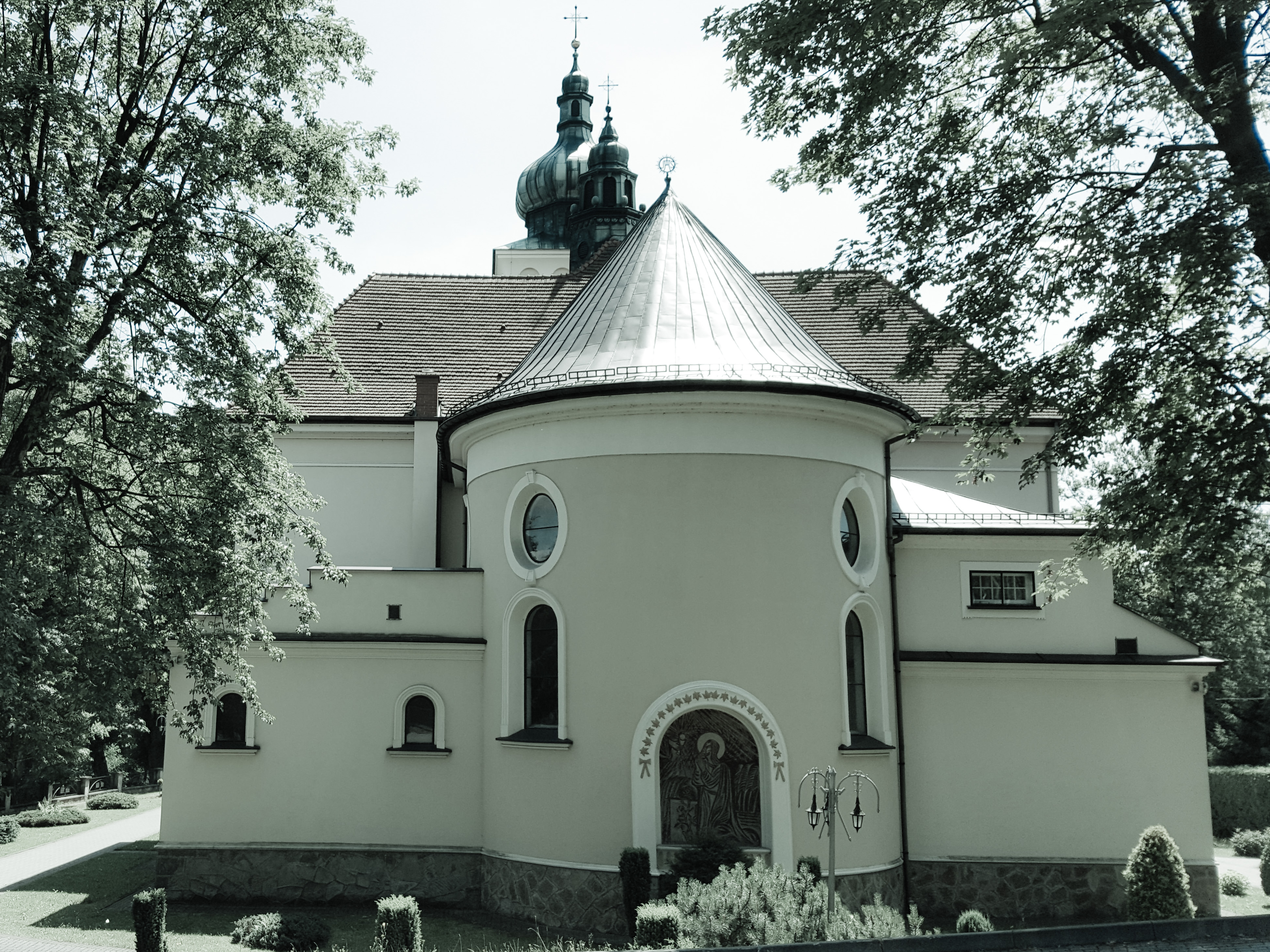 Kościół pw. Najświętszej Maryi Panny Wniebowziętej w Pleśnej